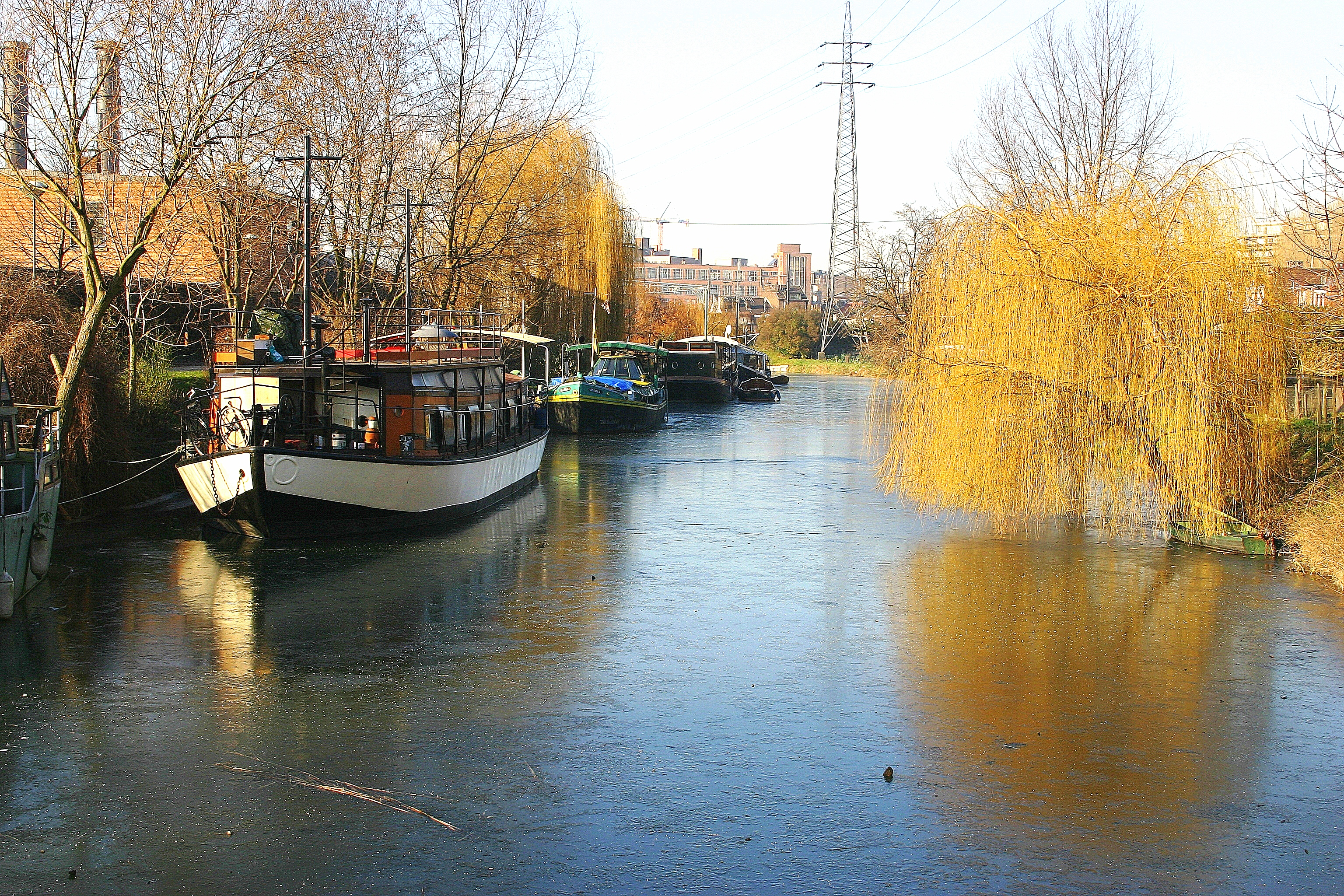 Hausbooter um Ourthe-Kanal vun der Marcotty-Bréck aus gesinn